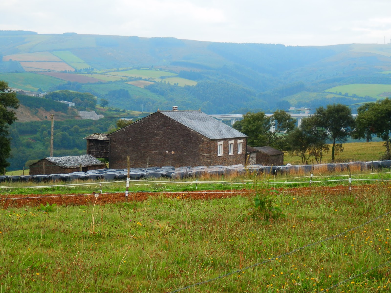 A Casanova, Seivane de Vilarente, Abadín, Spain.